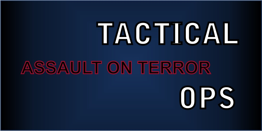 Tactical ops: Assault on Terror Neoficiální logo